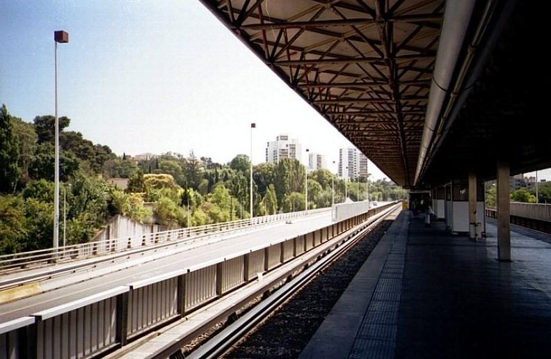 Station "Malpassé" de la ligne 1 du métro de Marseille.